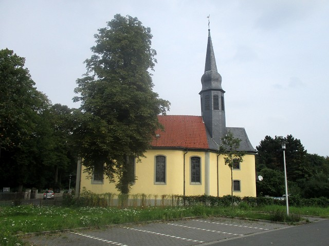 Hamm, Kirche St. Peter und Paul in Herringen